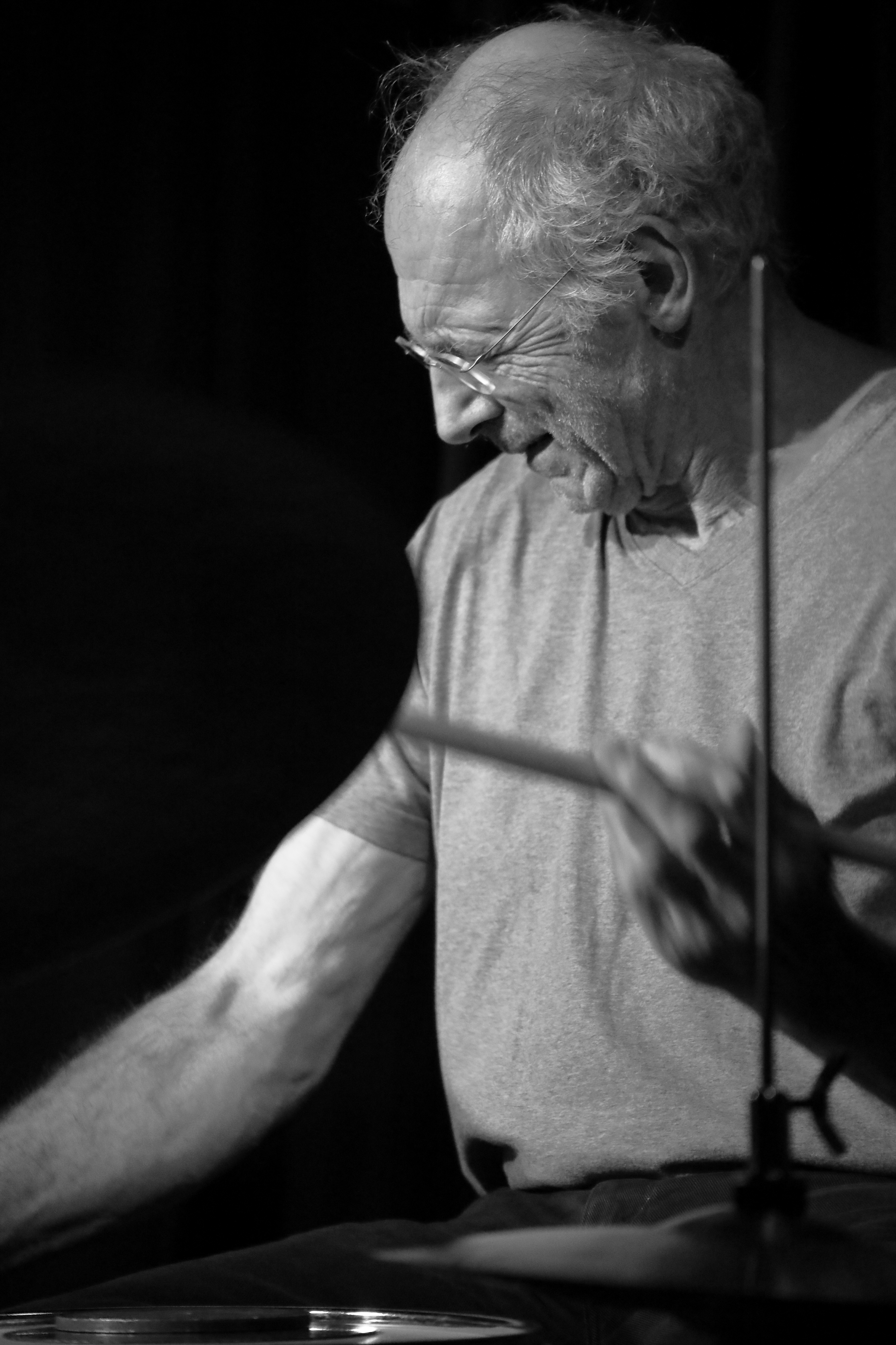 Das Schlippenbach Trio beim Konzert im Club W71, Weikersheim (2019): Alexander von Schlippenbach (Klavier), Evan Parker (Saxophon) & Paul Lytton (Schlagzeug).